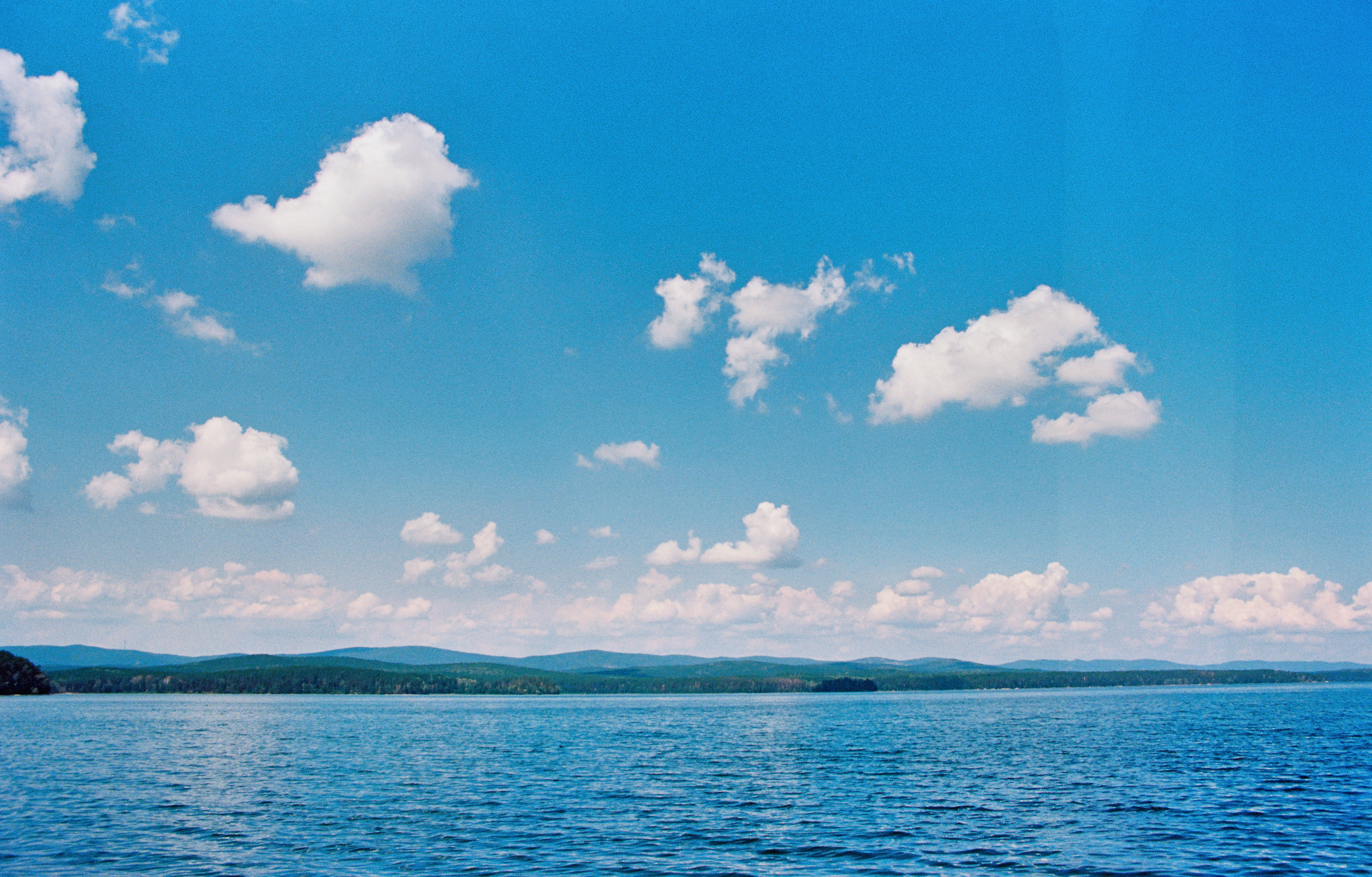 Озеро Большой Кисегач: Чебаркульский район, Челябинская область This image is related to the protected area of Russia number 7410302